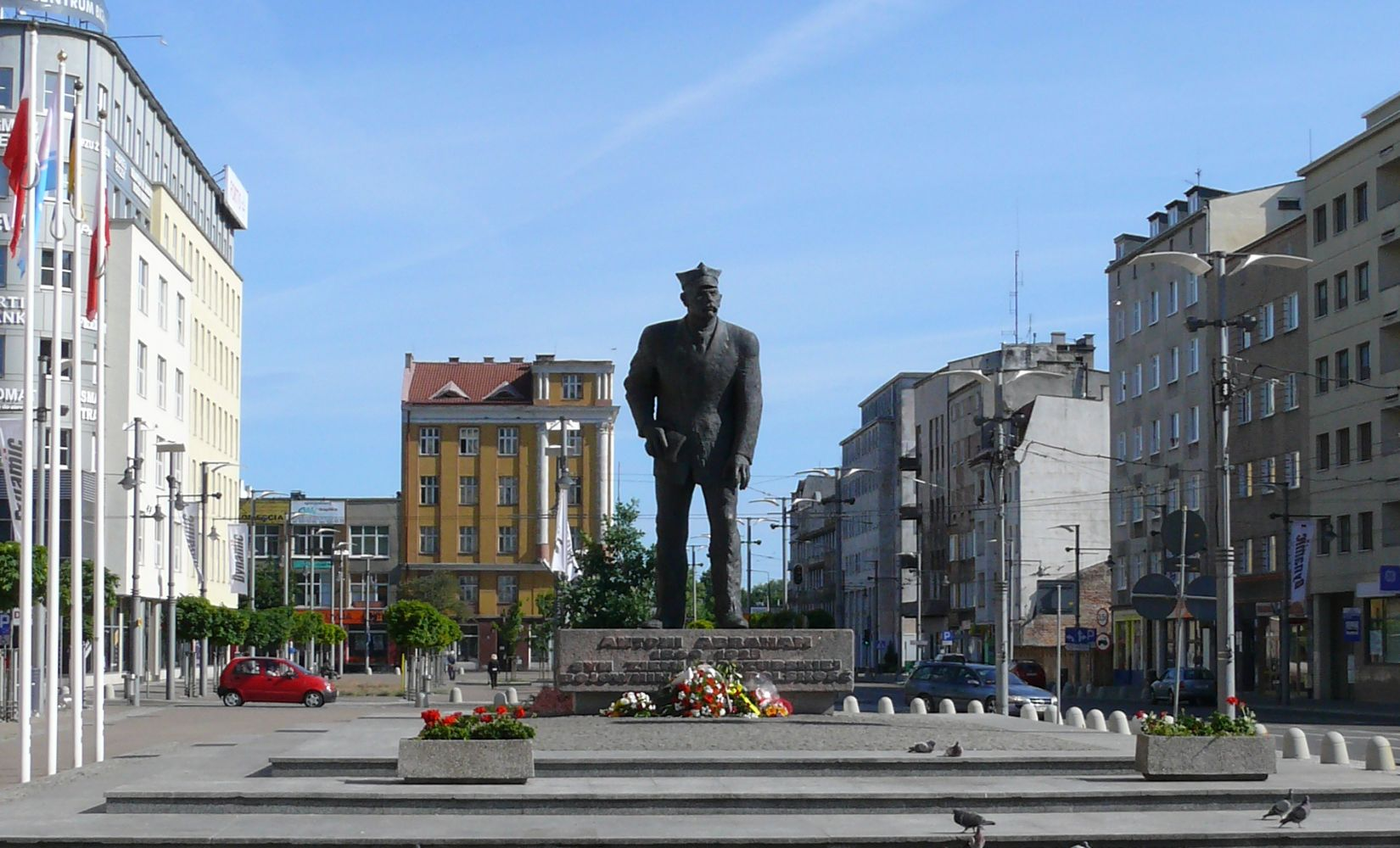 Plac Kaszubski - Pomnik Antoniego Abrahama w Gdyni